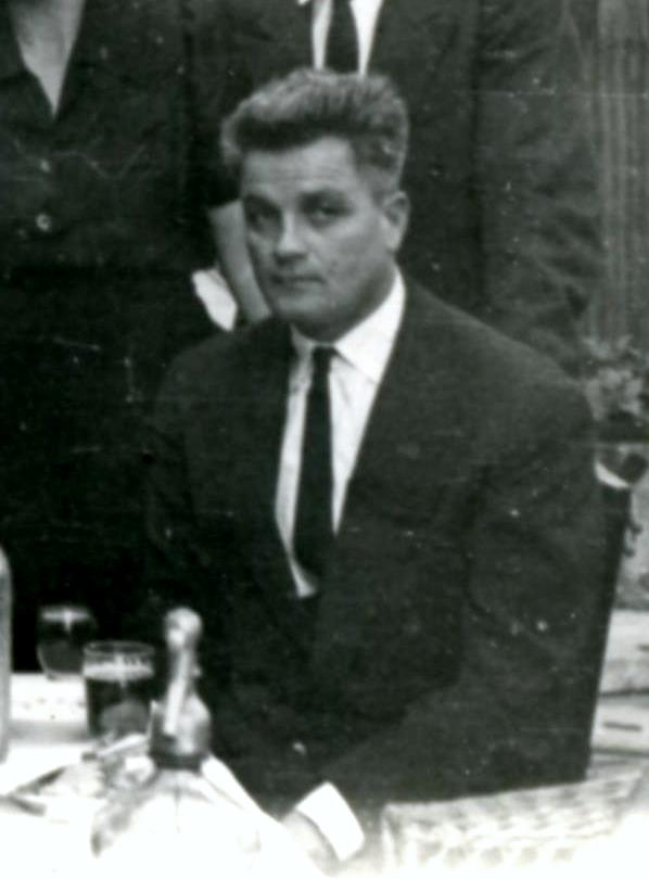 Deák Ferenc (Bamba) labdarúgó és családja.